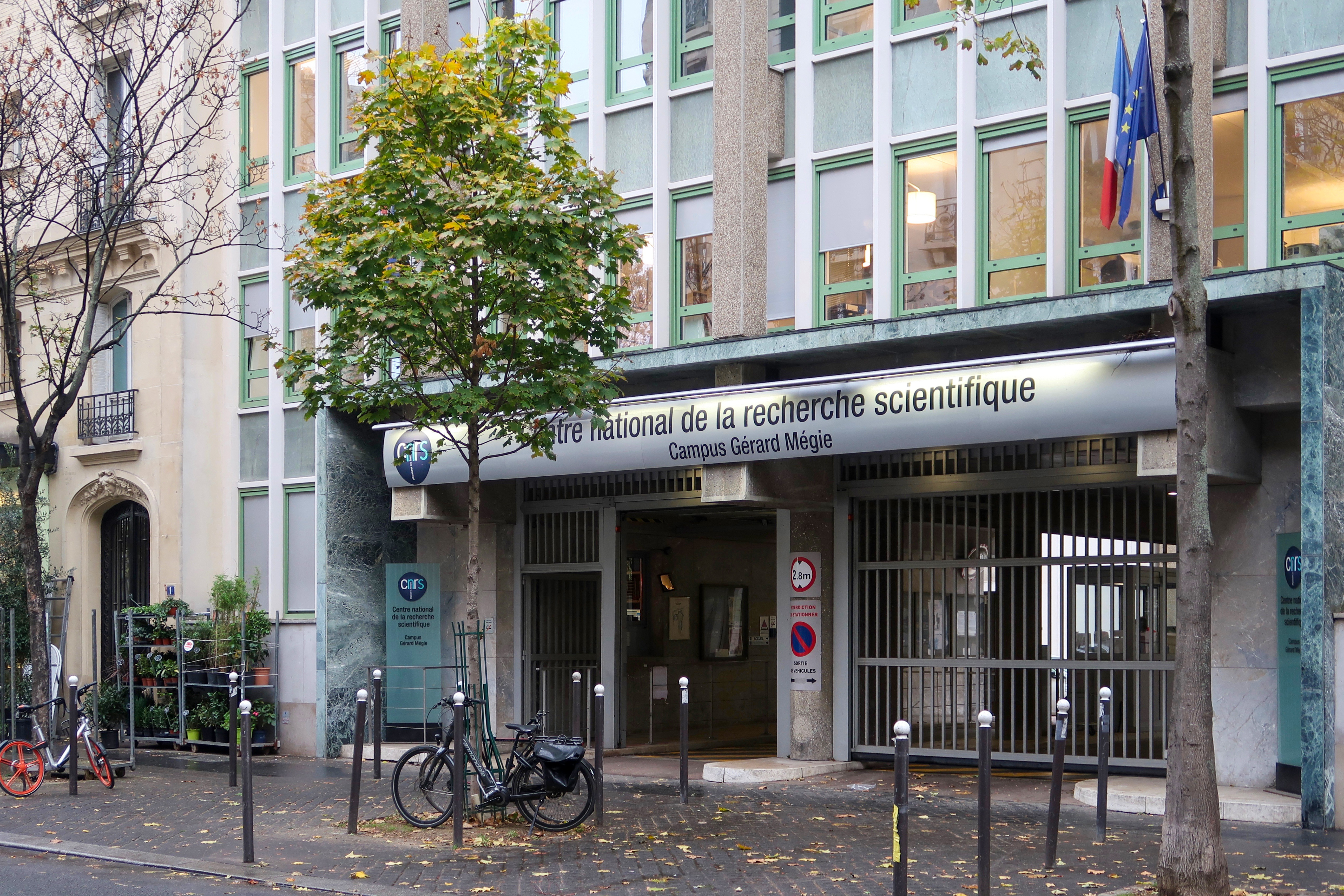 Siège du CNRS, n°3 rue Michel-Ange (Paris, 16e).